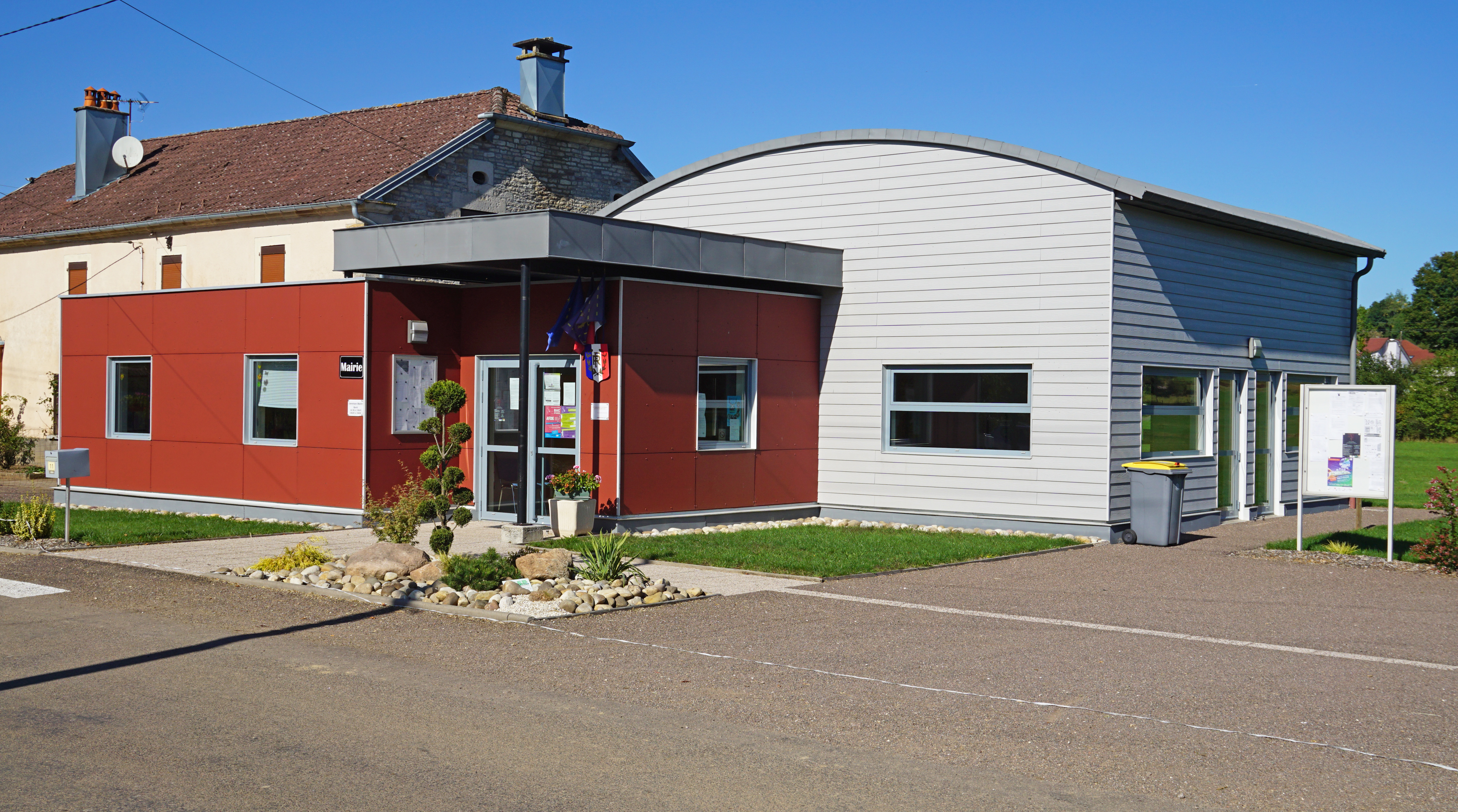 La mairie de La Corbière.